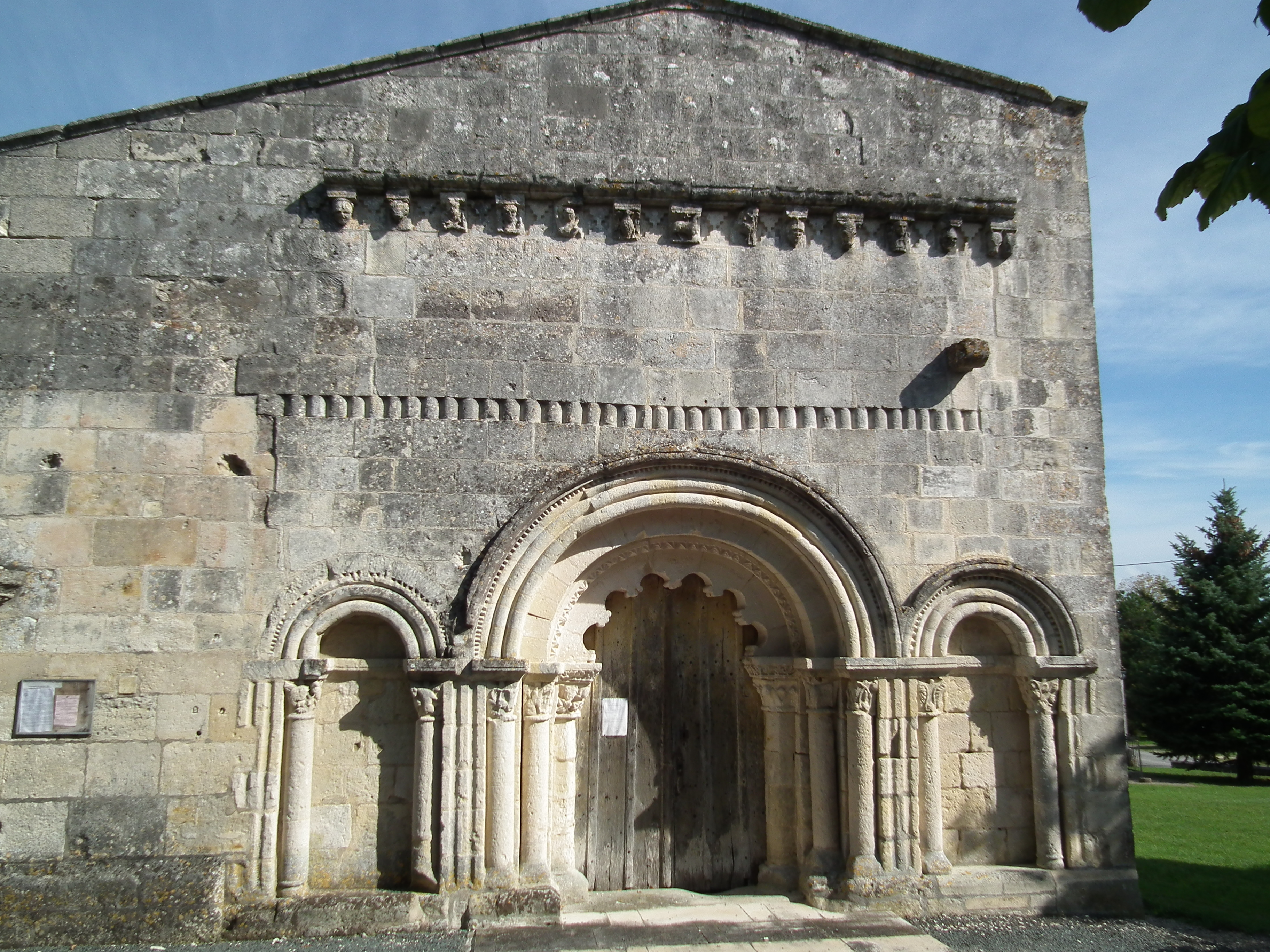 Façade de l'église romane de Neuillac